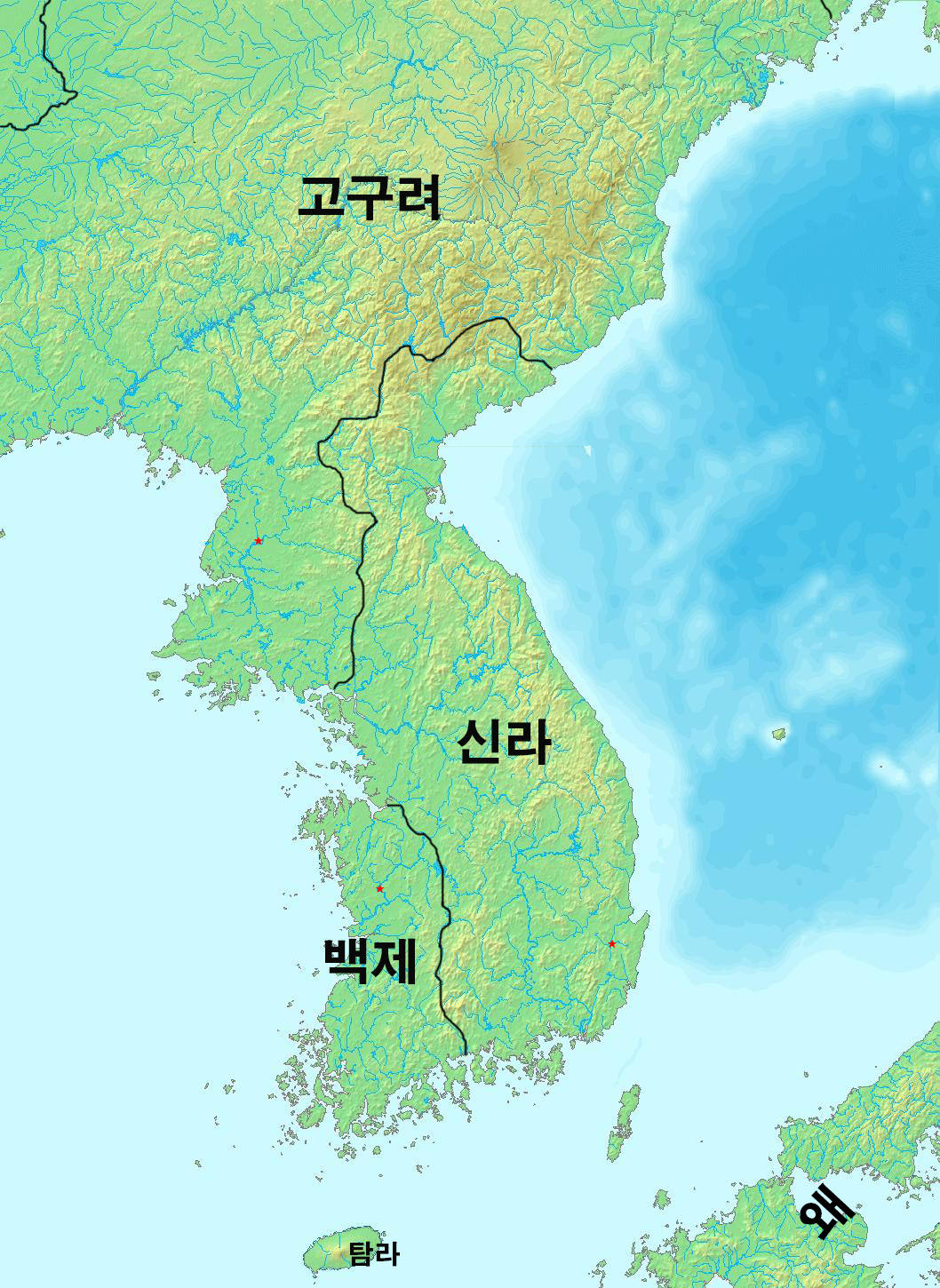 576년 삼국시대 한반도